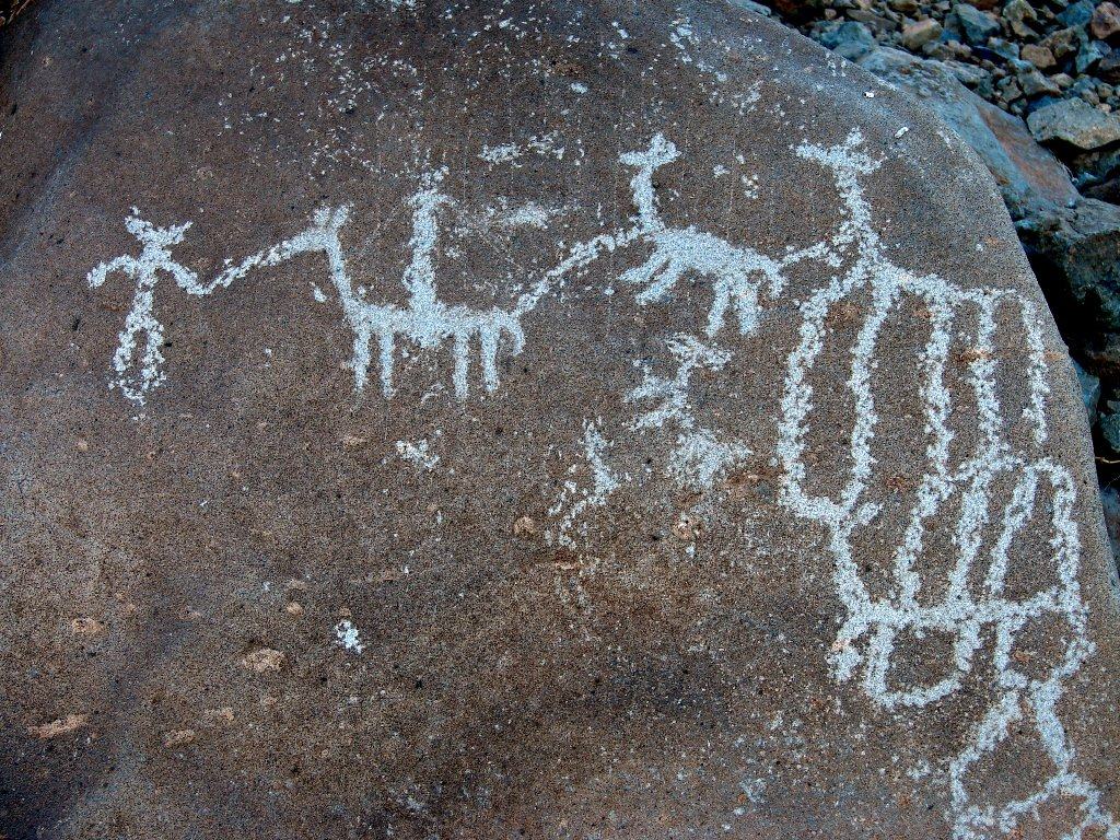 Petroglifo Sur de Atacama, Chile. Cultura